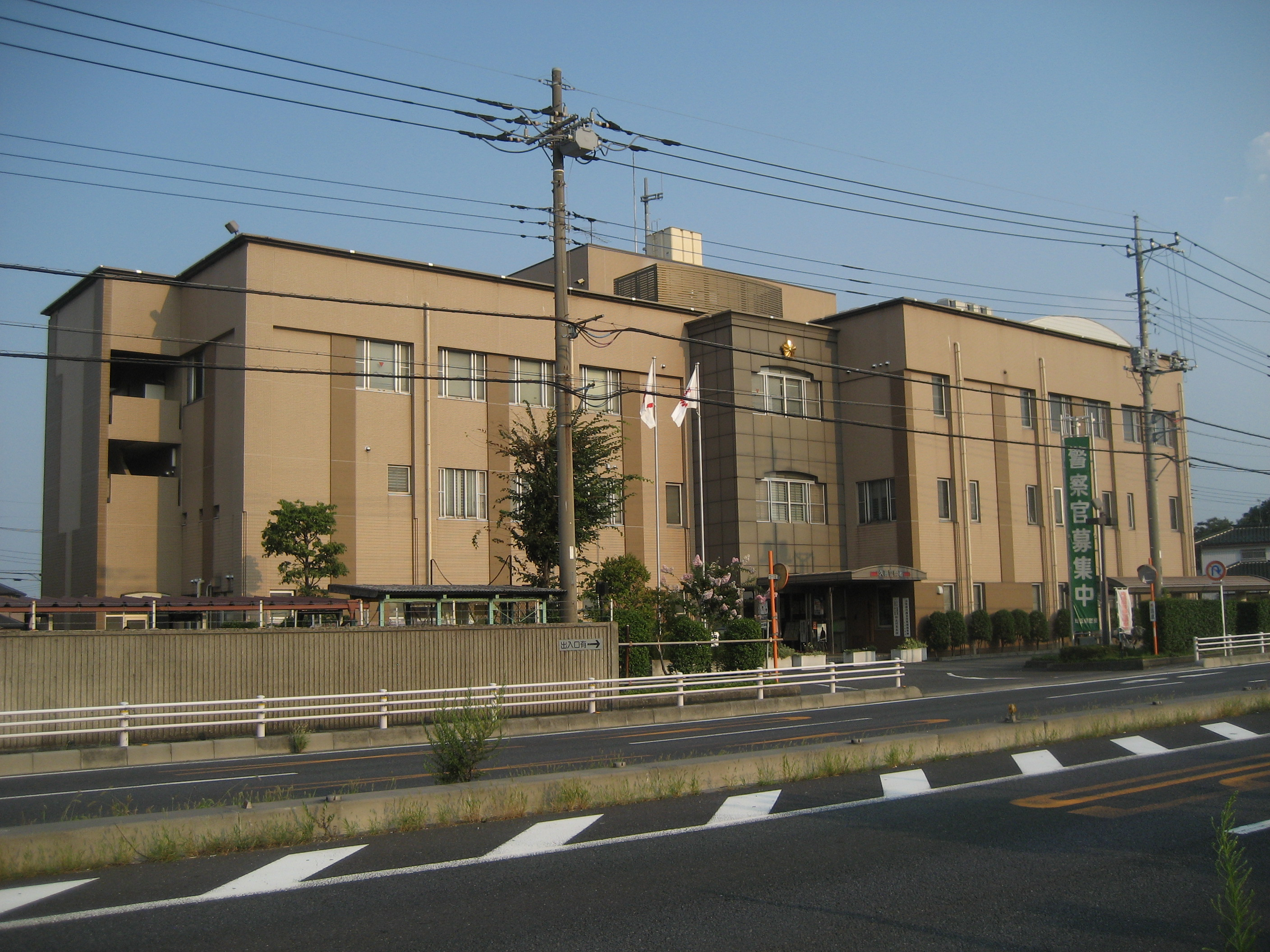 埼玉県久喜警察署庁舎